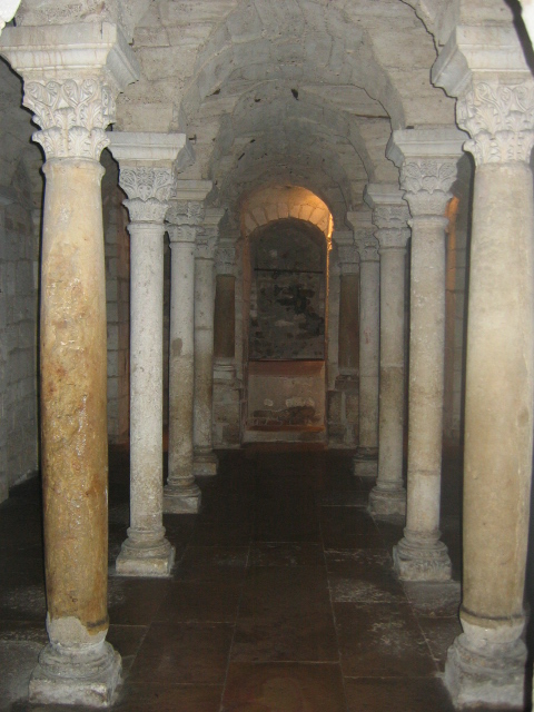 Tournus, Saône-et-Loire, Bourgogne, France. Abbatiale Saint-Philibert. Crypte.